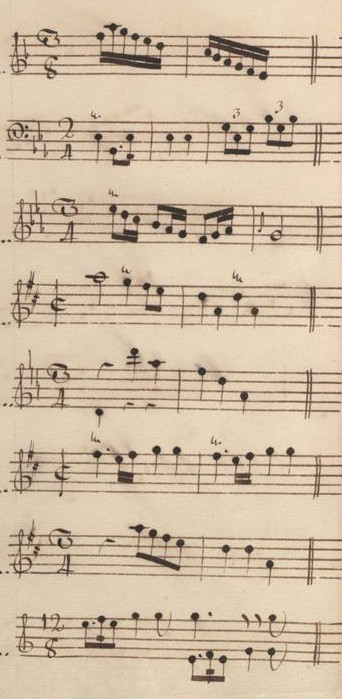 Table du volume XII des manuscrits de Venise (incipit des sonates 23 à 30, K.506-513).